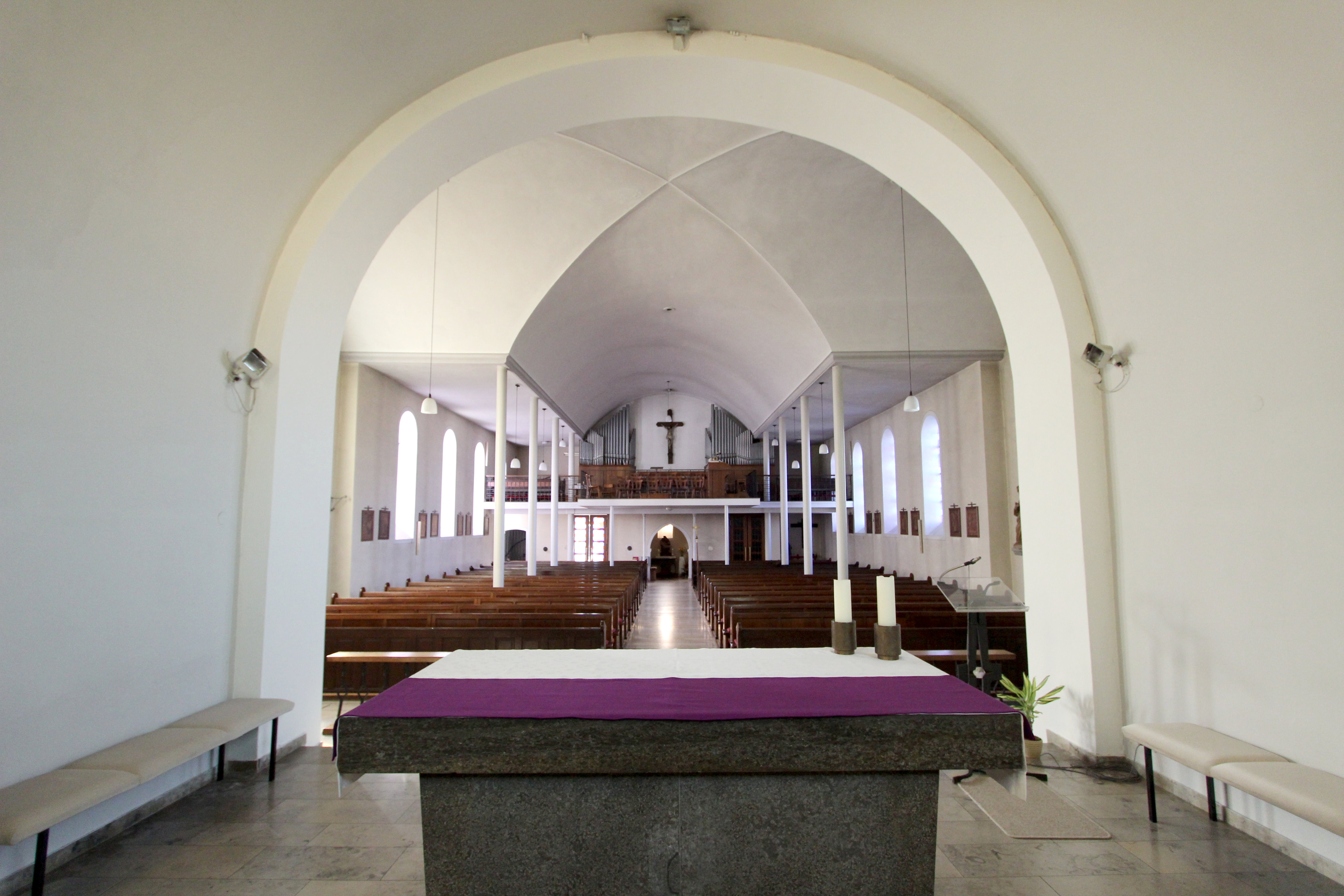 54634 Bitburg-Mötsch, Ringstraße. Mittelalterlicher Westturm, Schiff bezeichnet 1786, Querhaus mit Vierungstürmchen 1922/23, Architekt Eduard Endler, Köln; das ehemalige Südportal heute Ehrenmal; Epitaph, Rotsandstein, bezeichnet 1600, Nachfolge der Trierer Bildhauerschule des Hans Ruprecht Hoffmann; Kirchhofskreuz, 1873. Aufnahme von 2018.